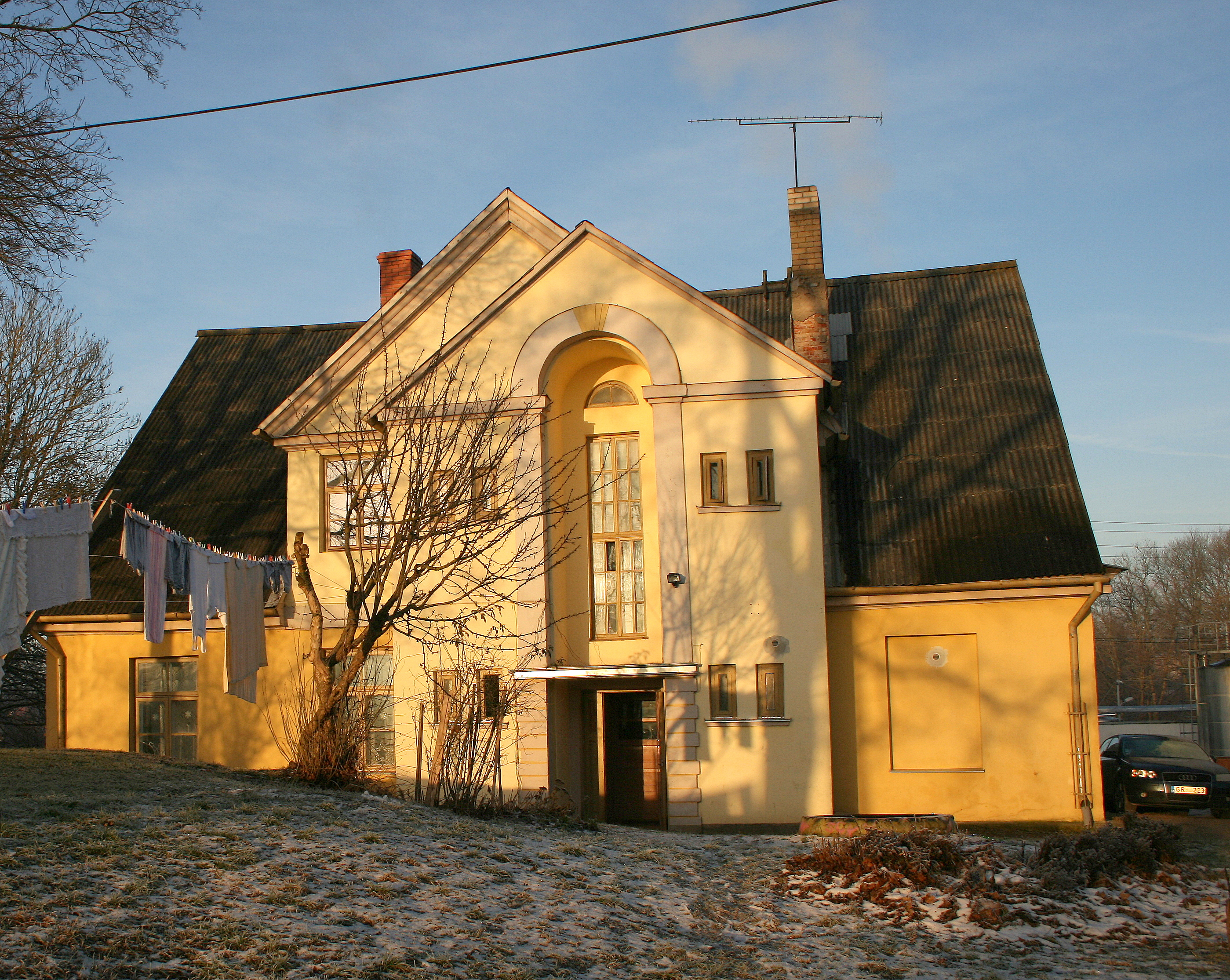 Talsi synagogue